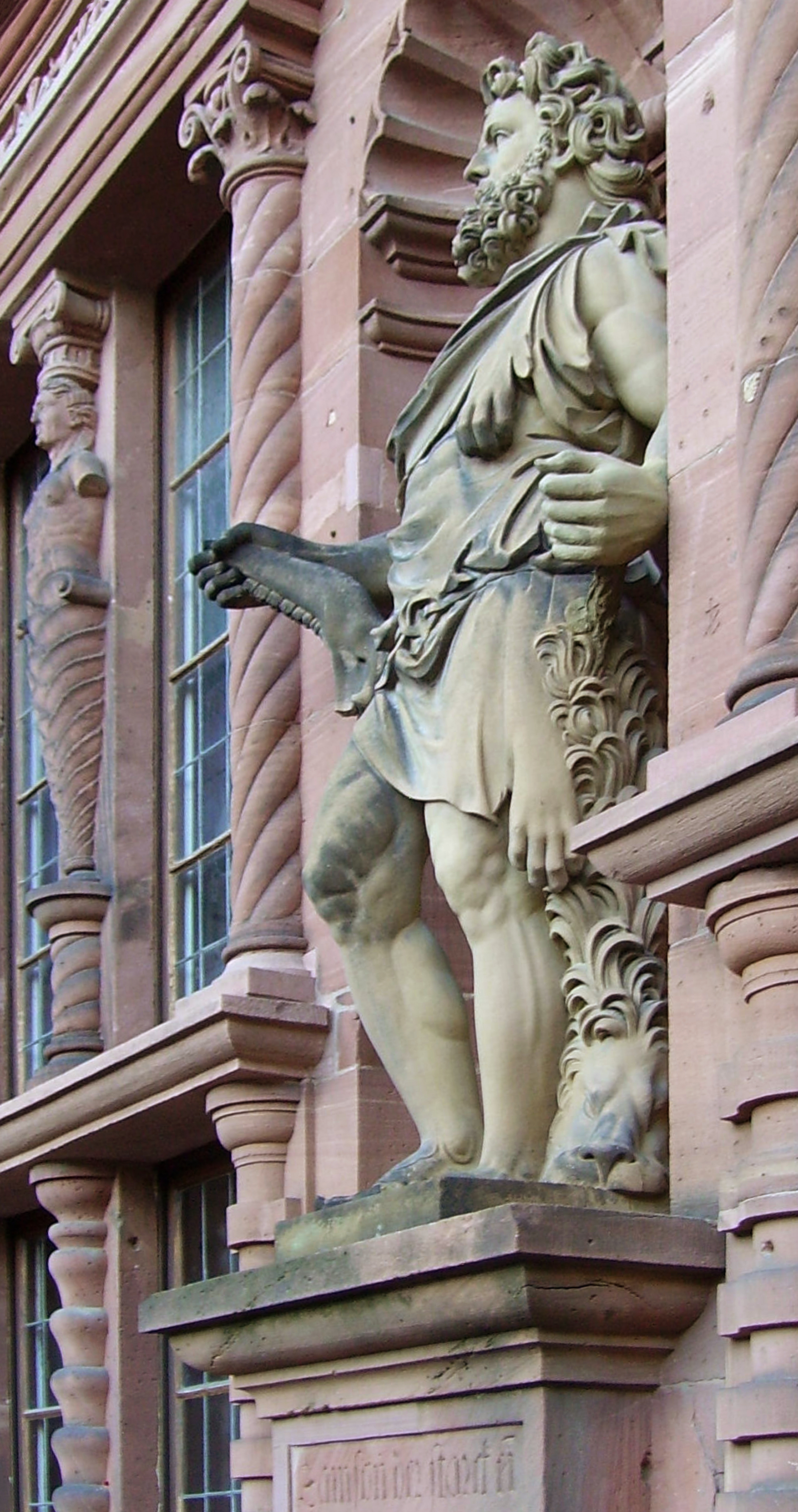 view of Heidelberg Castle